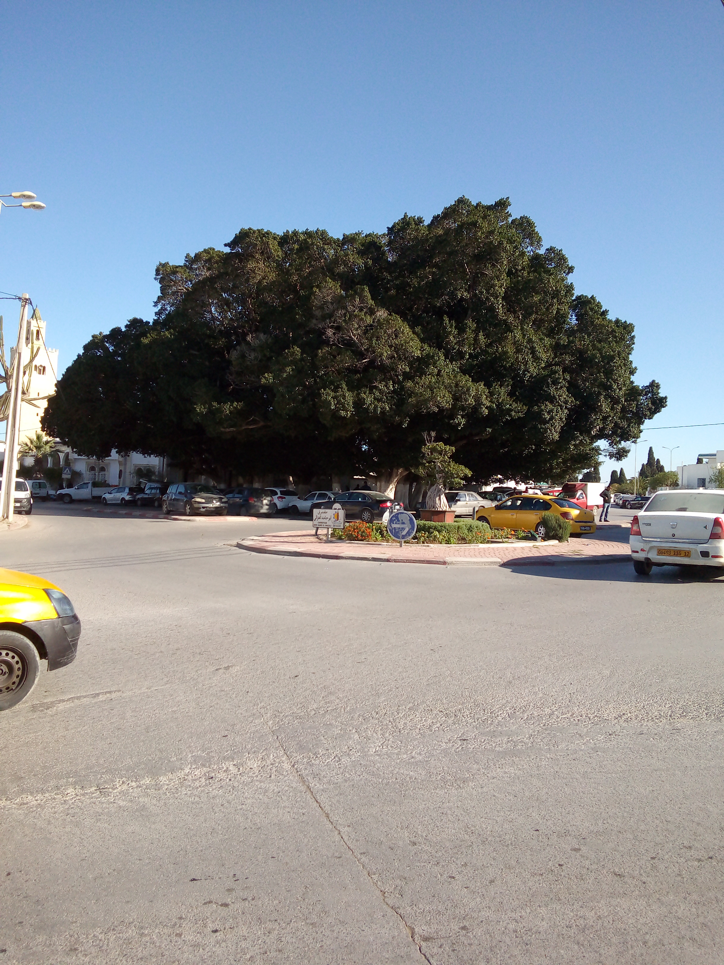 اشجار منسقة لتكون شجرة واحدة